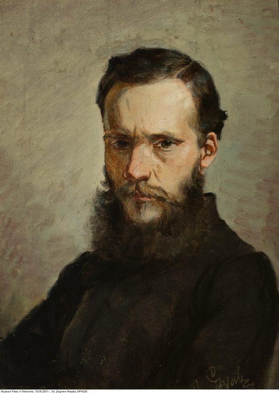 Portret Piotra Kozakiewicza z 1865, autor Grabowski, Andrzej (1833-1886),olej, tektura, 29,5 x 21.Muzeum Narodowe w Warszawie.